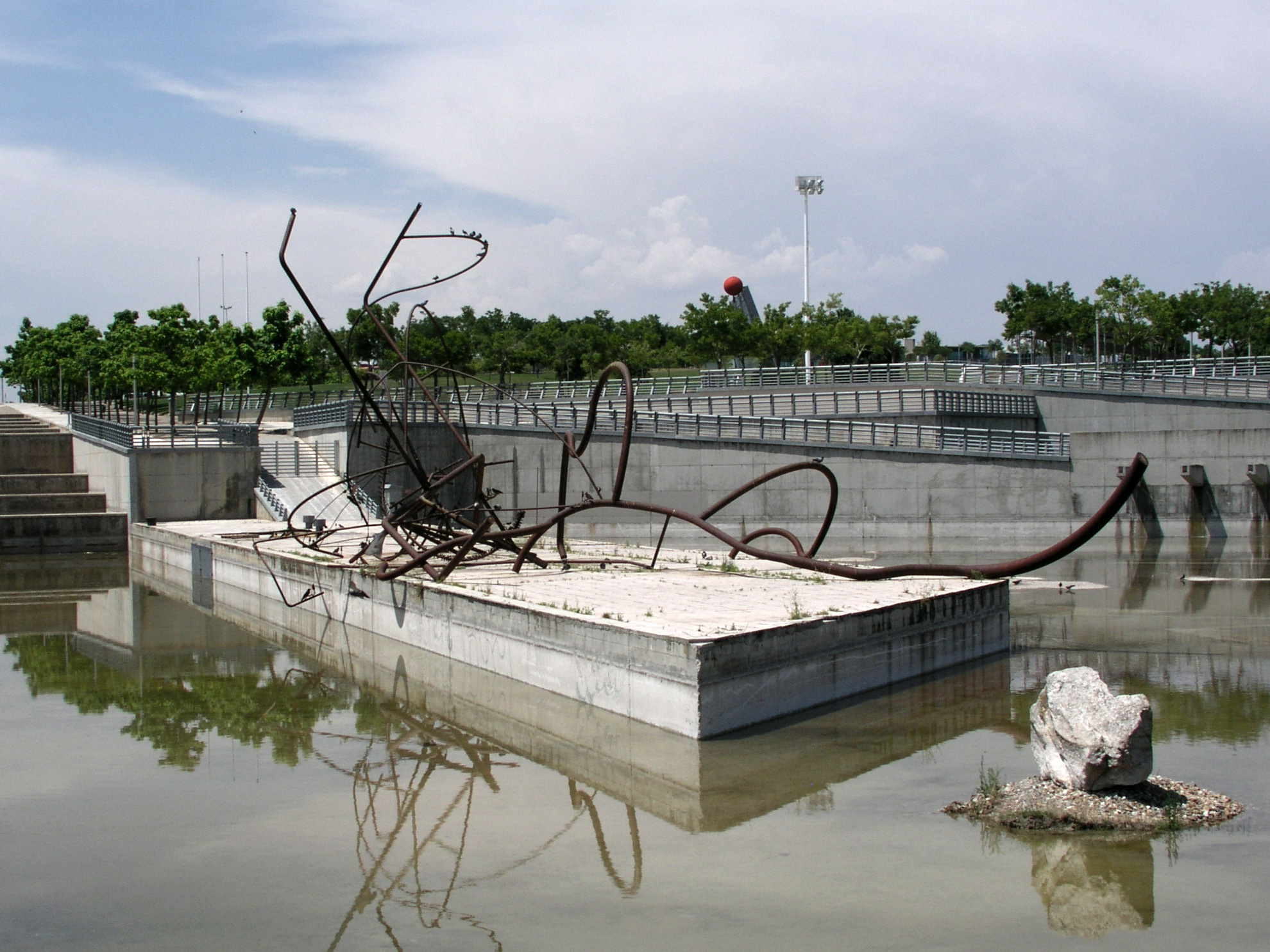 Parque de Juan Carlos I, Madrid, Spain. "Paseo entre dos árboles", by Jorge Castillo.